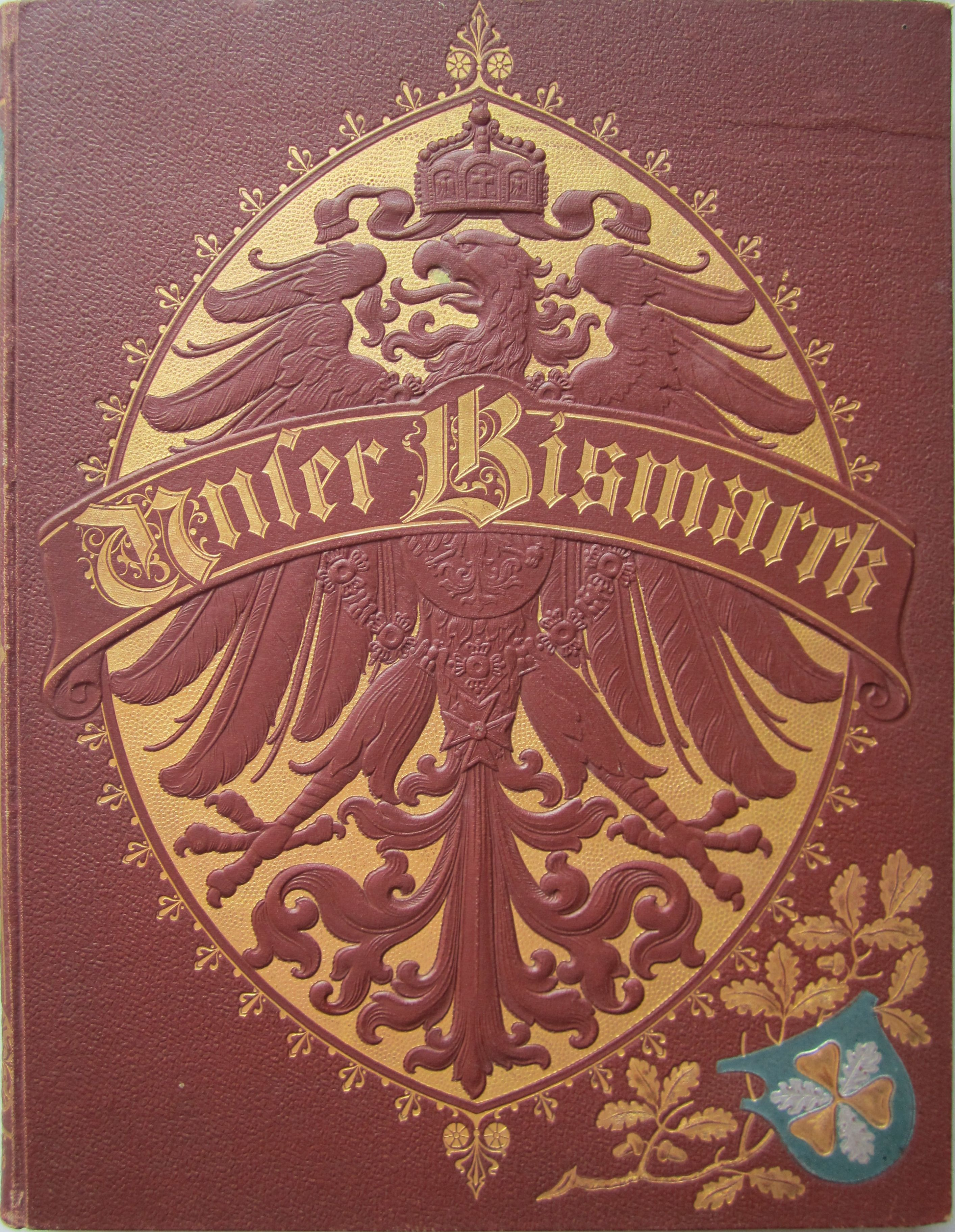 Titelansicht des Buchs "Unser Bismarck, Gedächtnis-Ausgabe"